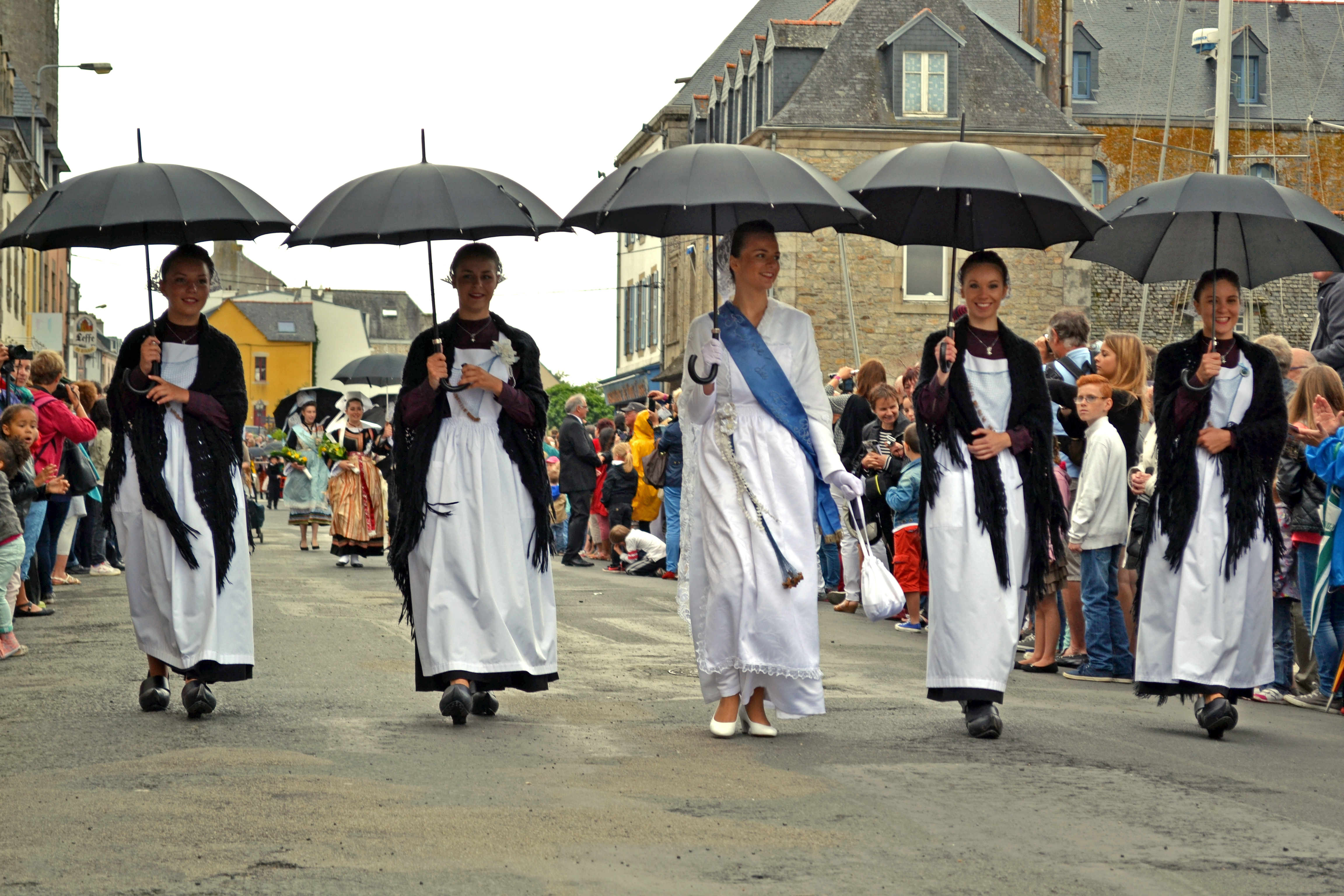 Défilé des Reines invitées (Reine des Filets Bleus de Concarneau) lors de la Fête des Brodeuses à Pont-L'Abbé le dimanche 13 juillet 2014.